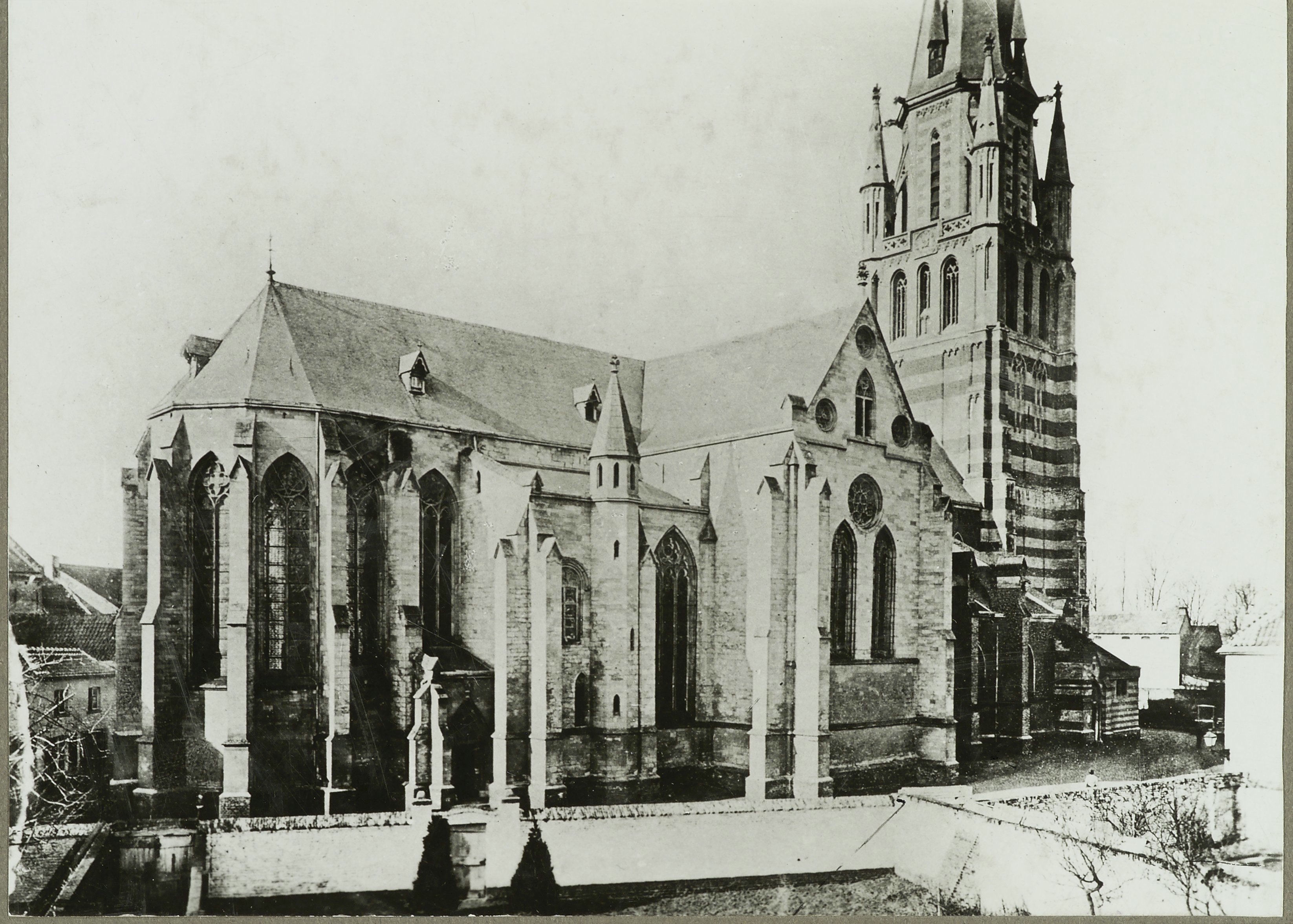 Rooms-Katholieke Kerk: Zicht vanuit het noordoosten